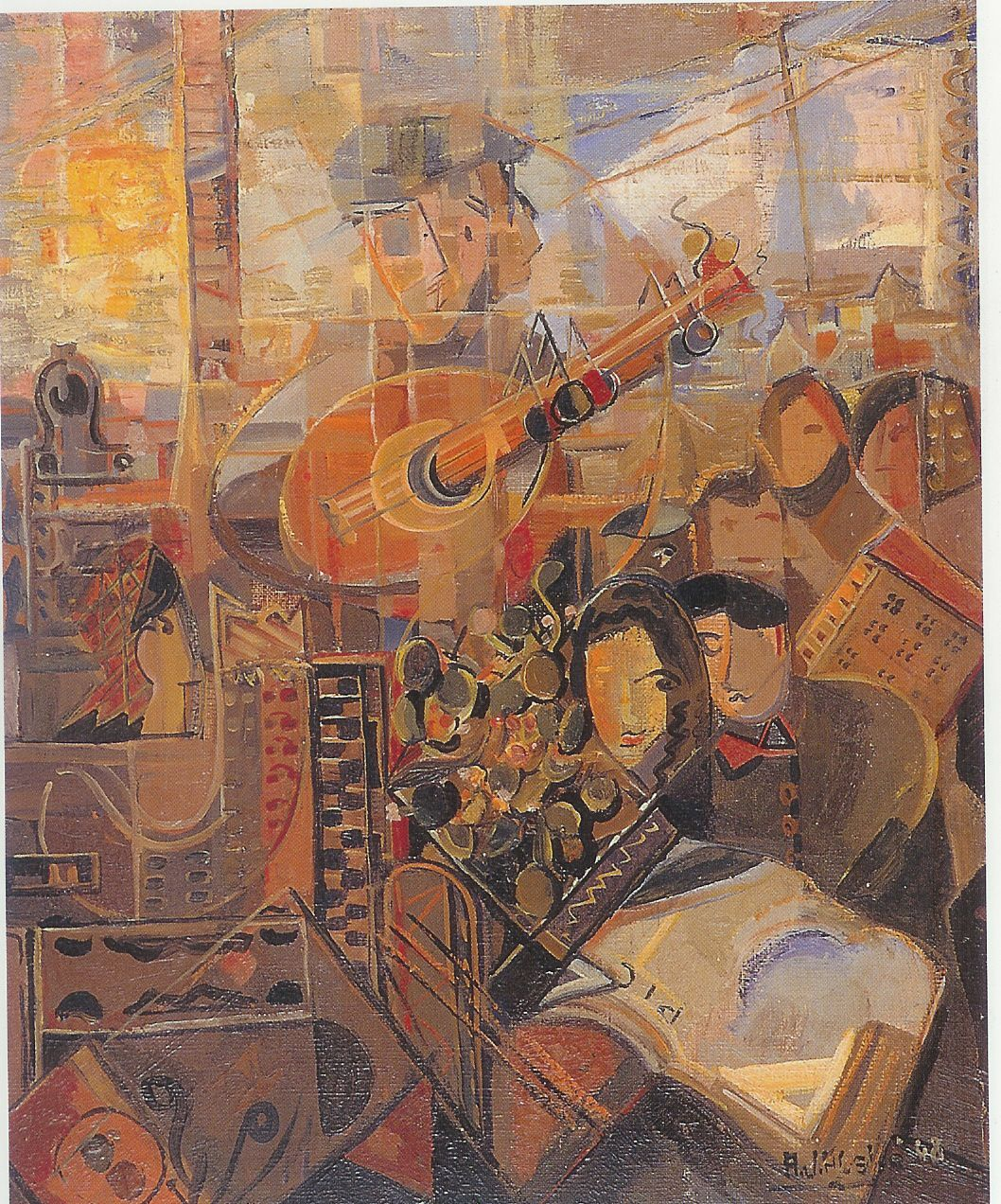 Quadre cubista que representa l'interior d'un tren amb un músic